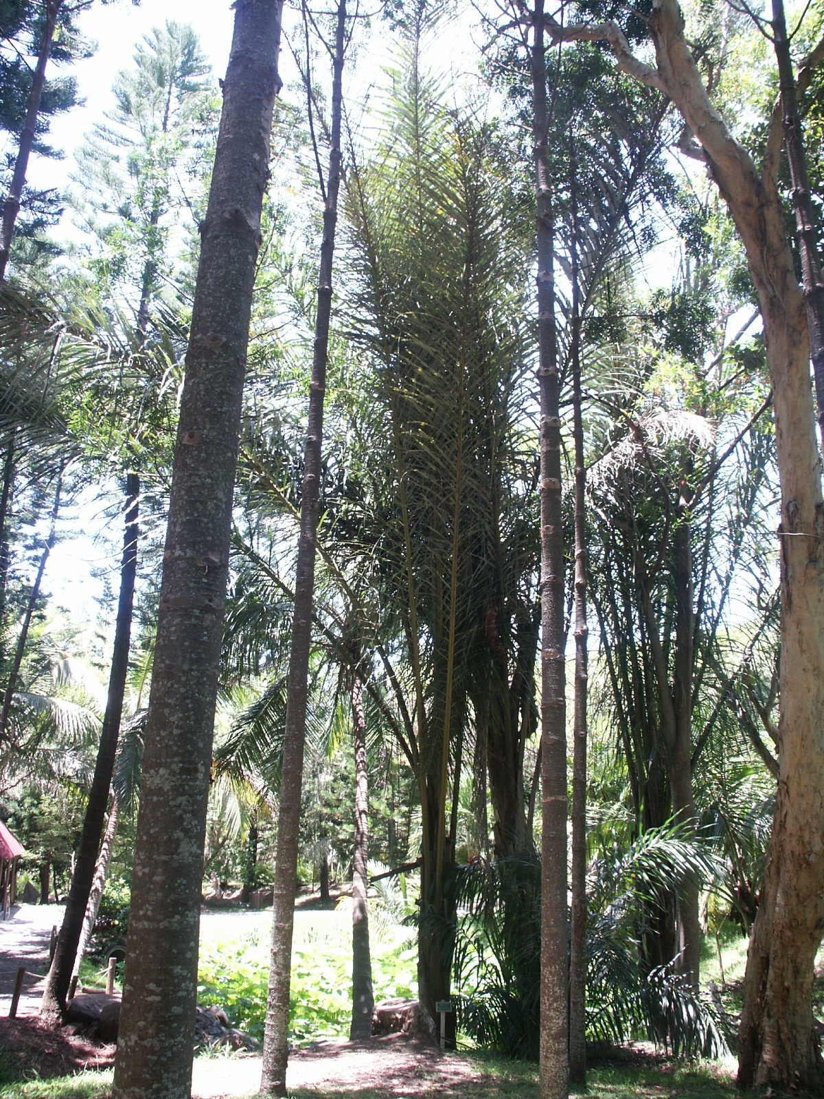 Raphia farinifera. Parc forestier de Nouméa - Nouvelle-Calédonie.